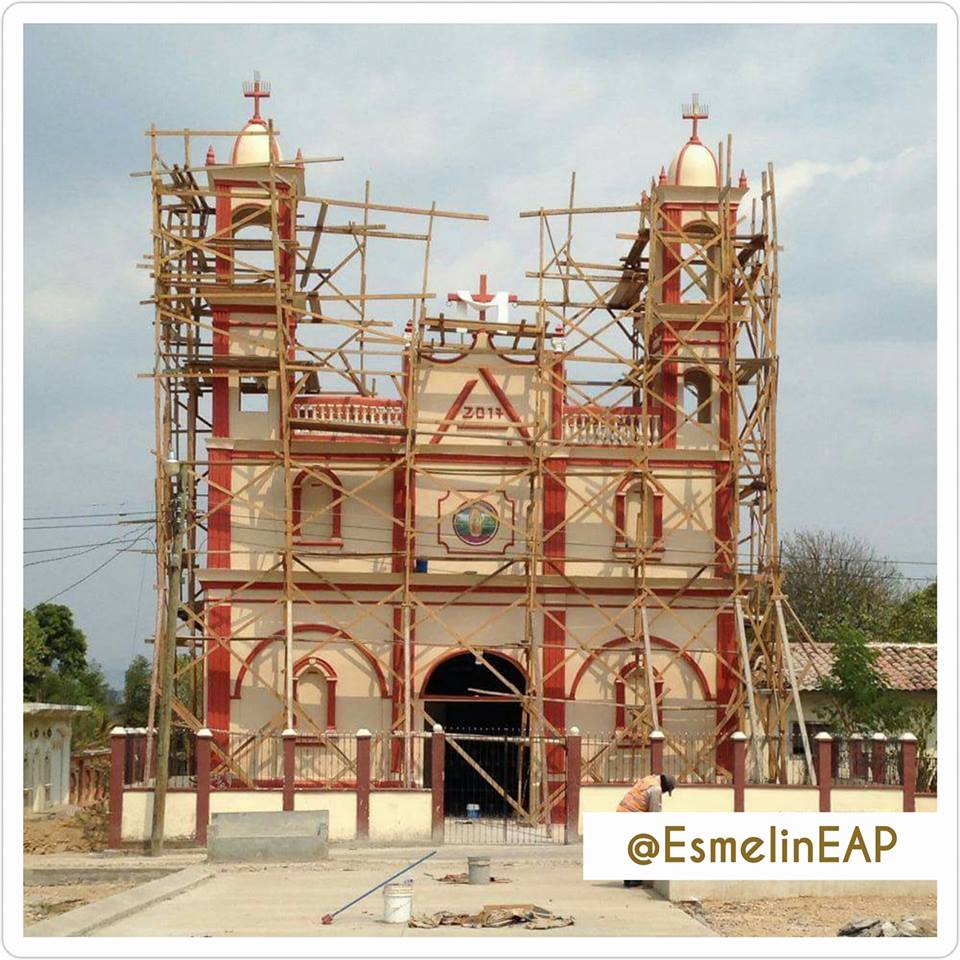 Iglesia del municipio de La Virtud by Esmelin Alvarenga